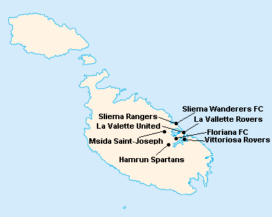 Répartition des clubs en First Division Maltaise 1924-1925.